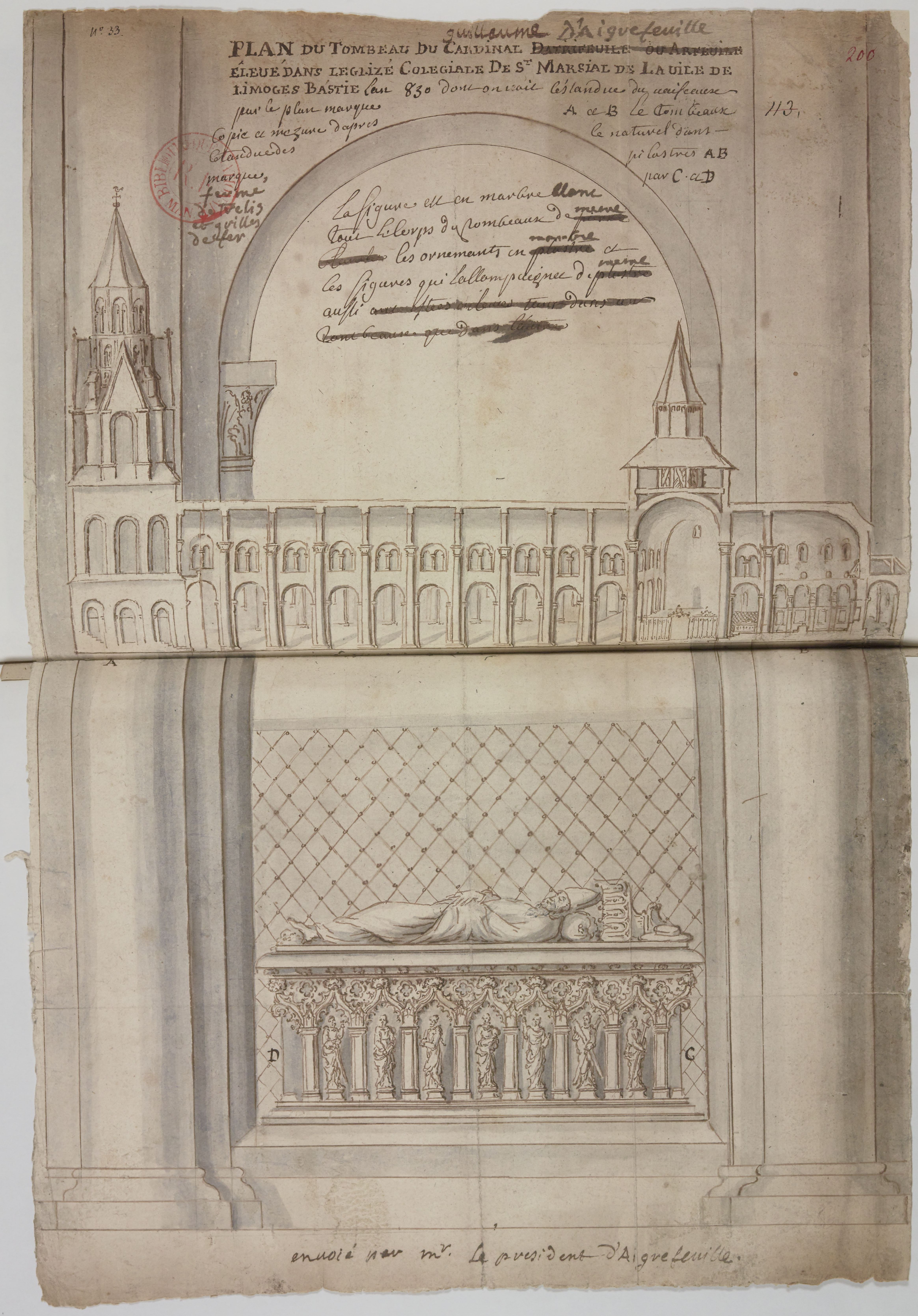 coupe longitudinale de Saint-Martial de Limoges et tombeau du cardinal d'Aigrefeuille, extrait des papiers de Montfaucon.